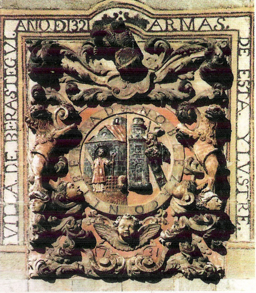 Berastegiko armarria